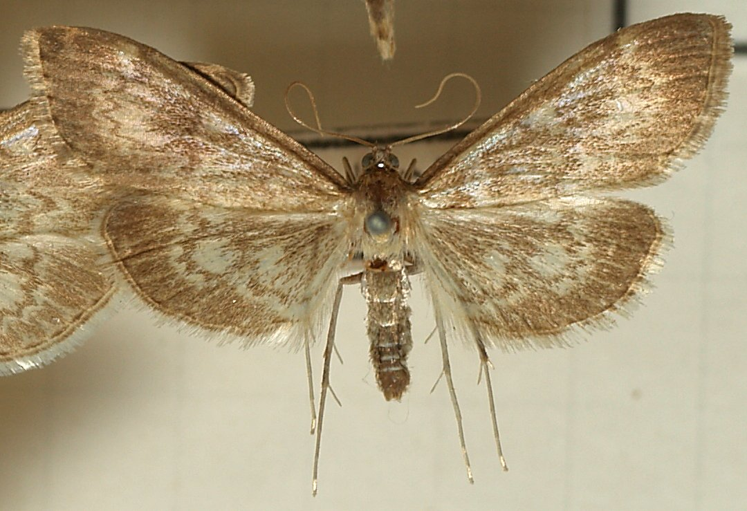 Perinephela lancealis